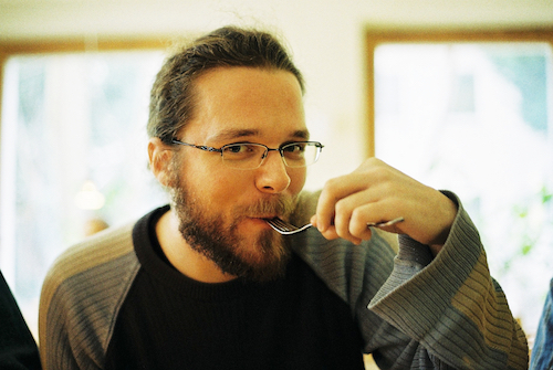 Arne Semsrott